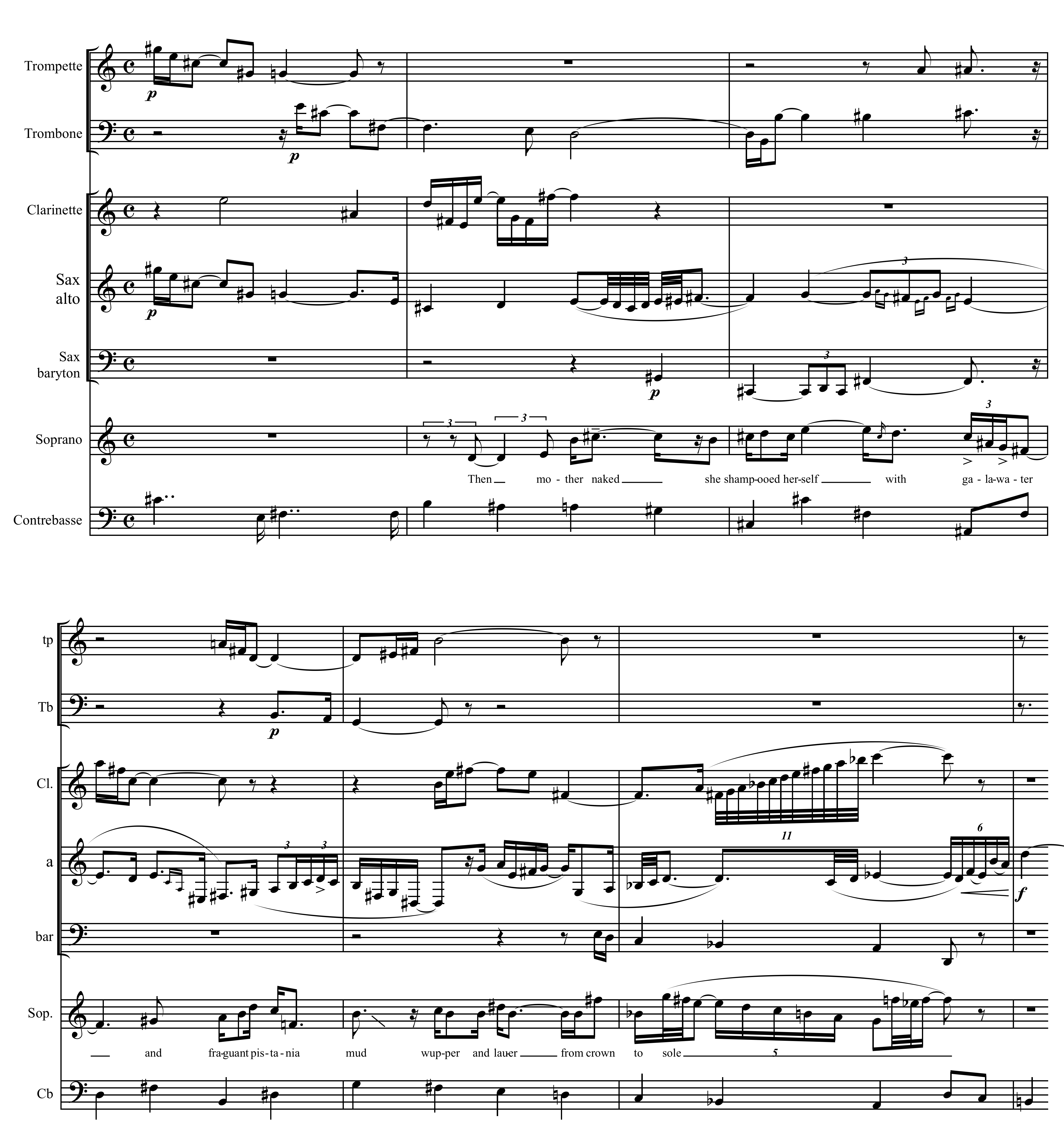 Extrait de la pièce XXV d'Anna Livia Plurabelle d'André Hodeir